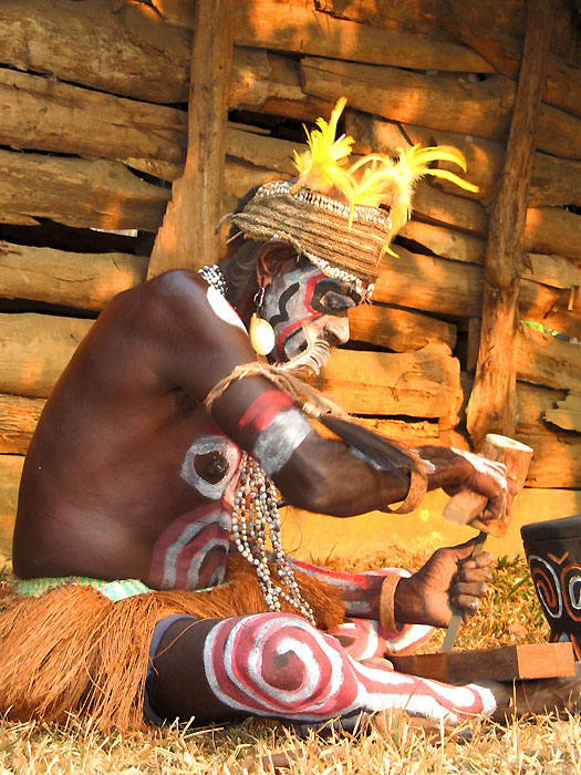 Orang suku Asmat dari Papua, foto diambil di TMII, Jakarta